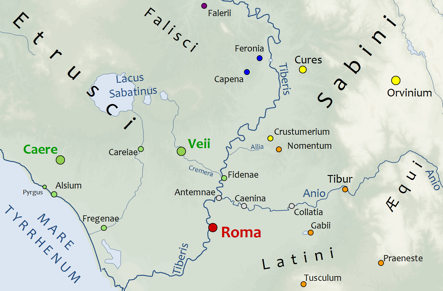 Carte des environs de Rome sous la monarchie (avec les cités d'Antemnae, Caenina, Collatia, Crustumerium, Fidènes, ...)